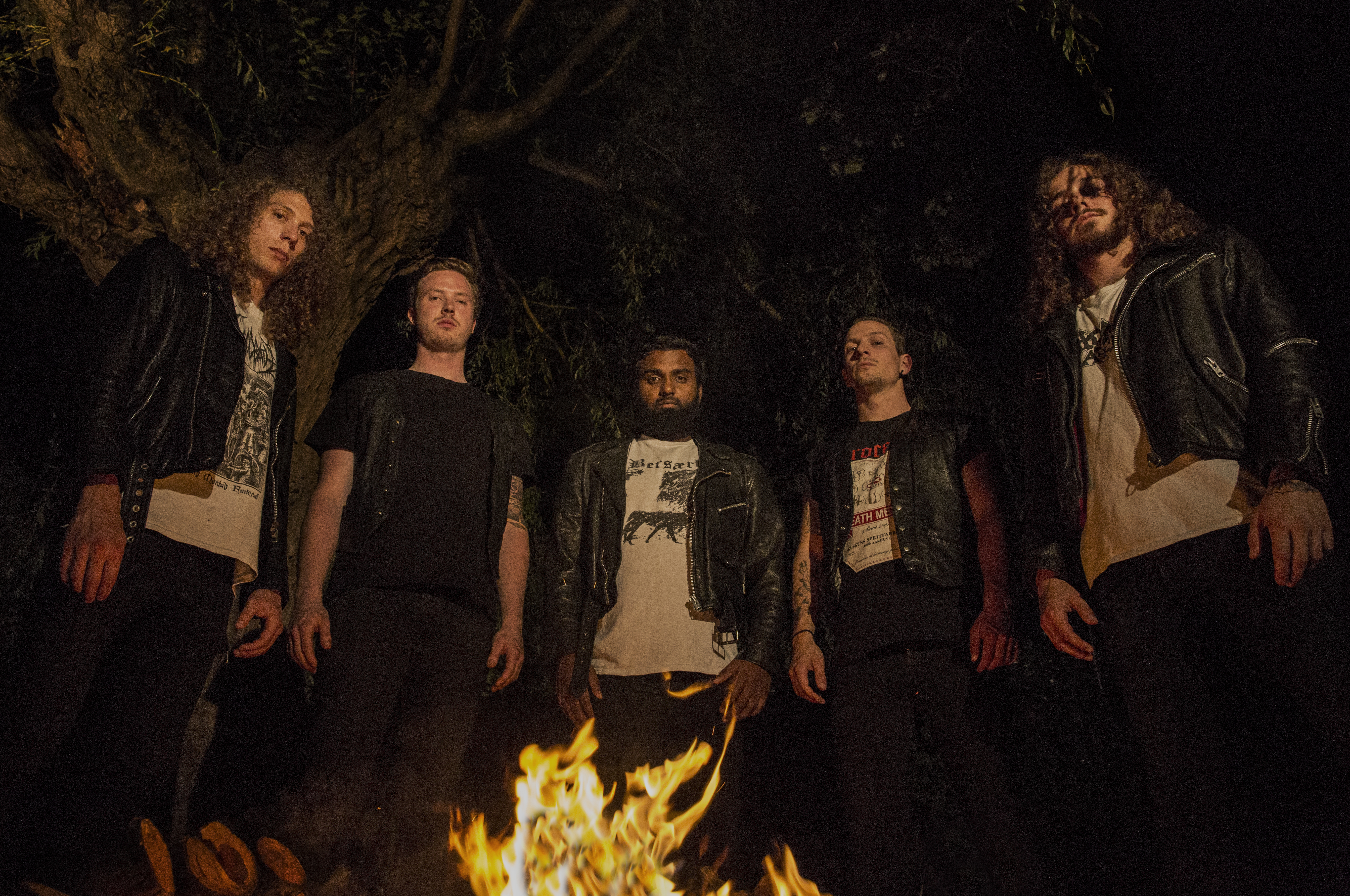 From left to right: Lasse, Sebastian, Mattias, Simon and Svend.